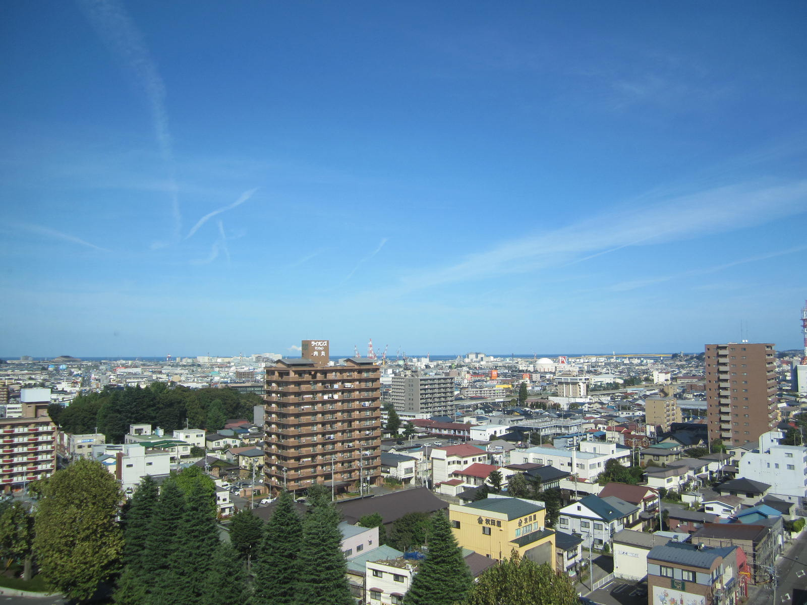 ラピア方面